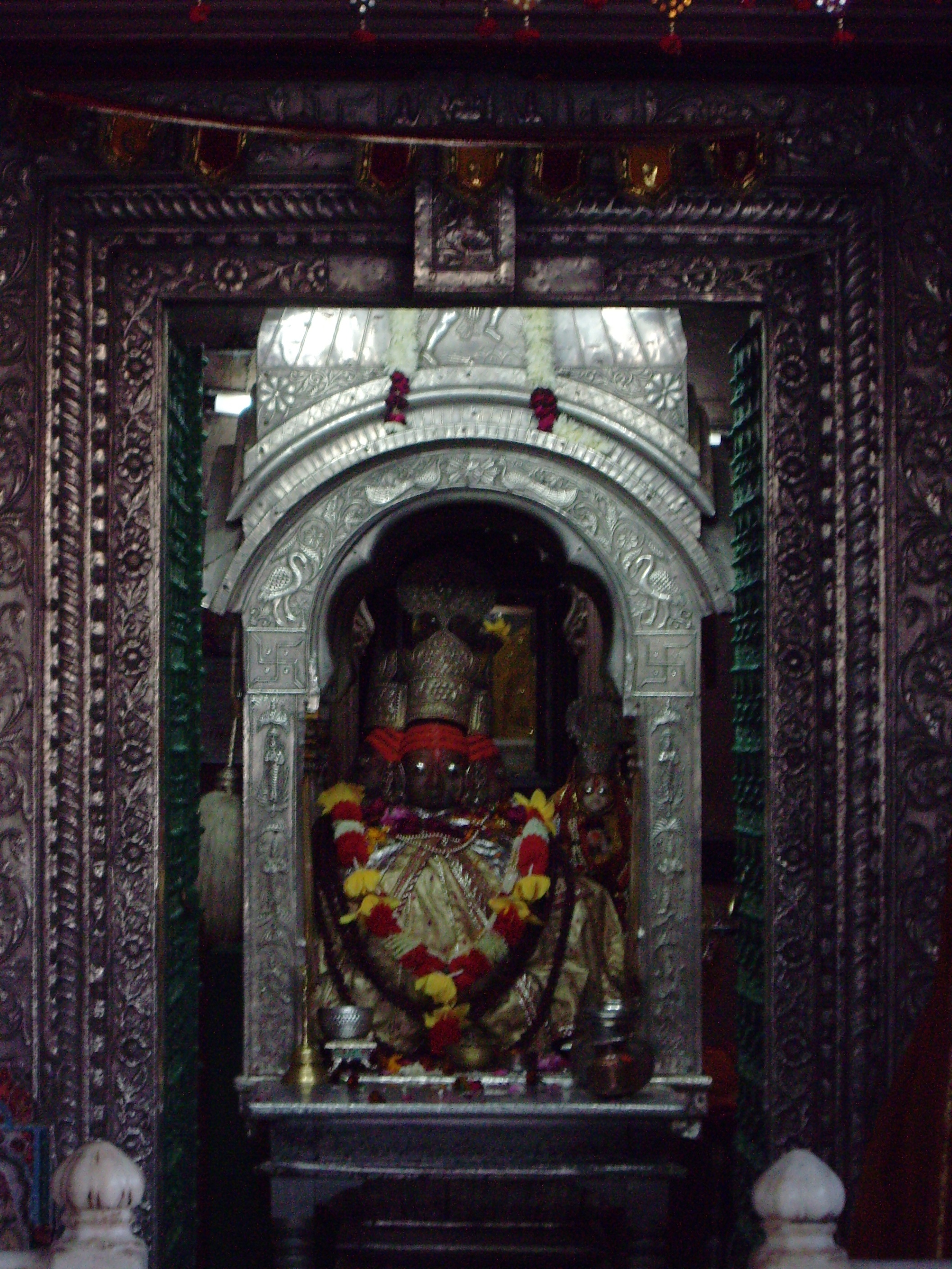 India (2007) Es uno de los pocos templos dedicados al dios Brahma (en India sólo existen 2 templos dedicados a él). Brahmā es el dios creador del universo y miembro de la Tri-murti (‘tres formas’), la triada conformada por Brahmā (dios creador), Vishnu (dios preservador) y Shiva (dios destructor) Brahma temple, Pushkar